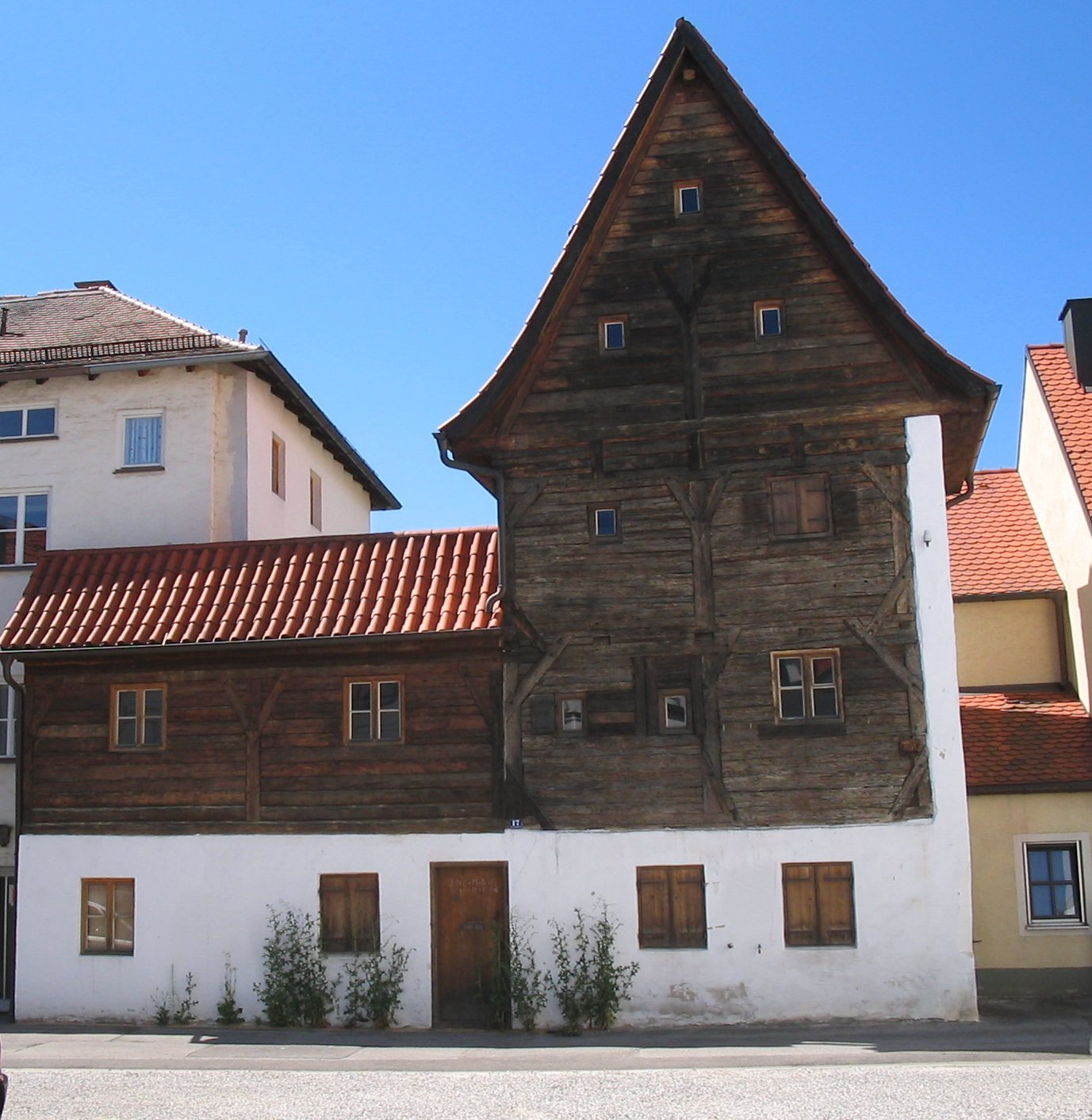 An der „Oberen Stadtmauer“ in Pfaffenhofen an der Ilm